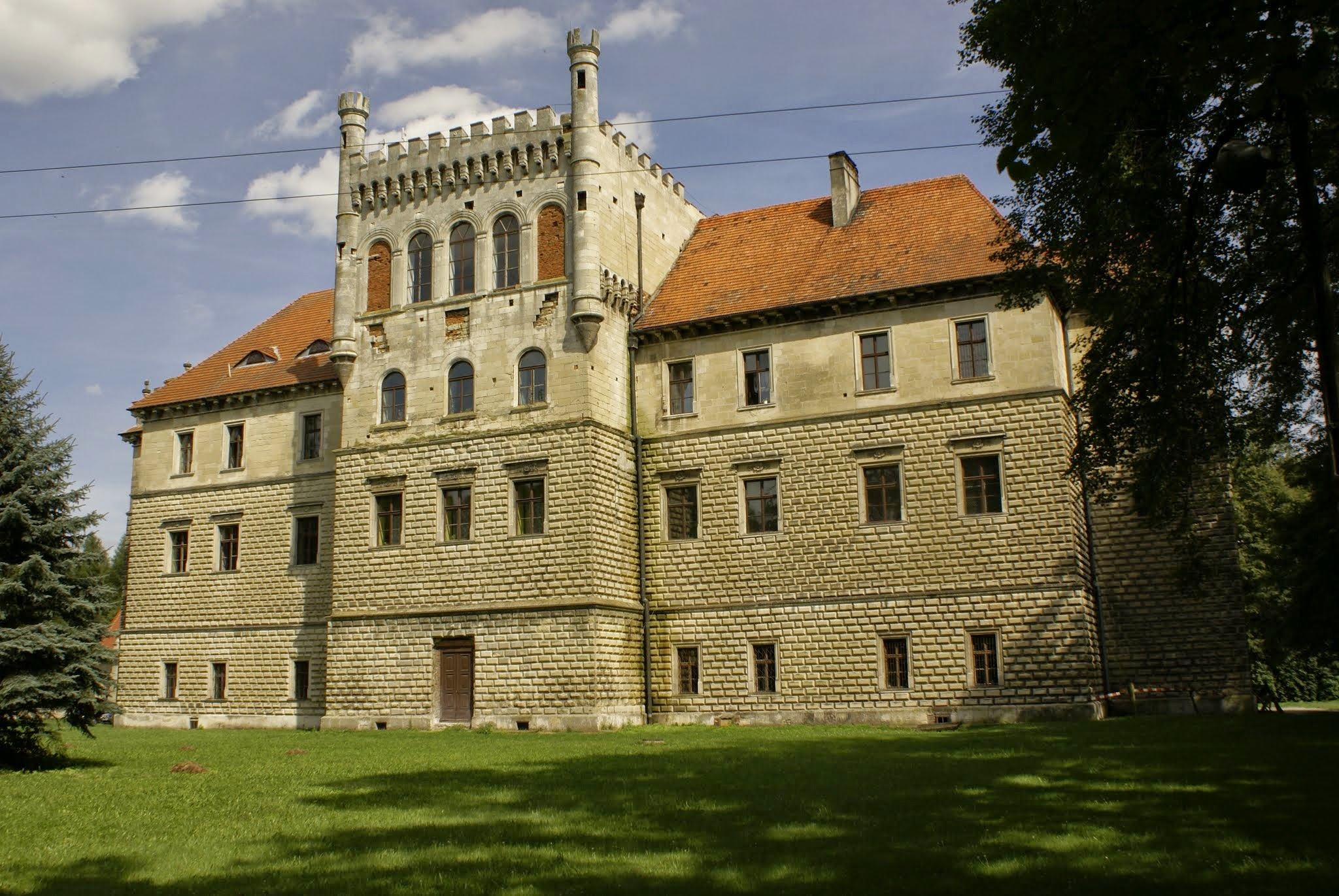 Książ Wielki, pałac, XVI